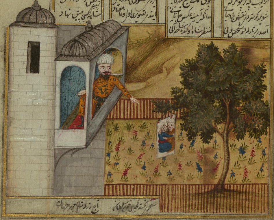 Un roi regarde une image de son fils et du tuteur de celui-ci, qui en est tombé amoureux.